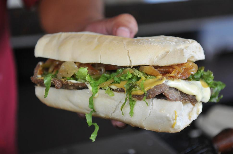 Sándwich de milanesa de la sandwichería EL 10, Yerba Buena